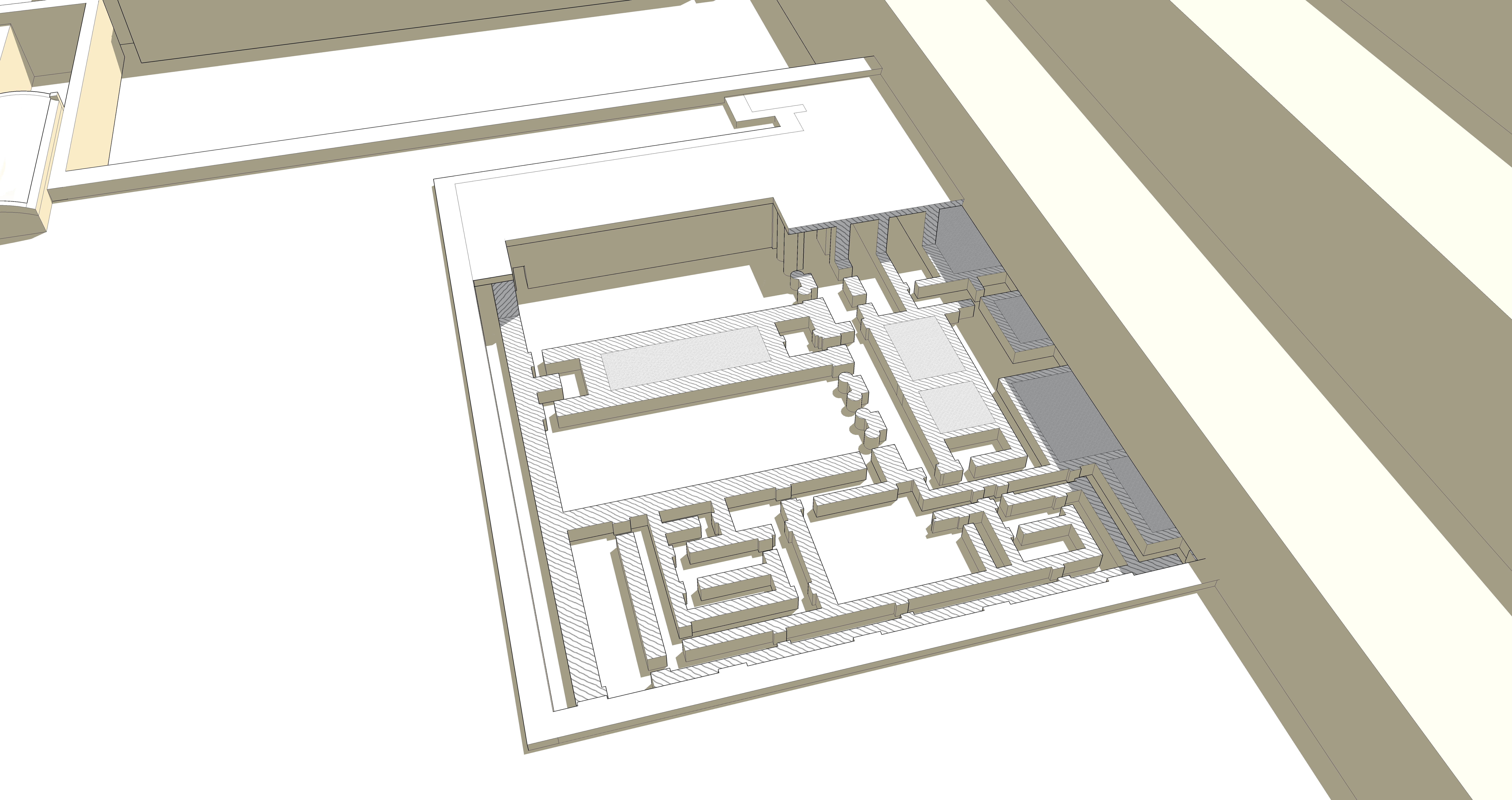 Vue en coupe du temple nord du complexe funéraire de Djoser